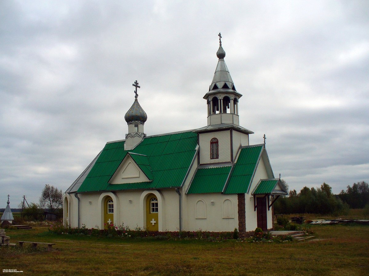 Мухавец. Свята-Уладзімірская царква